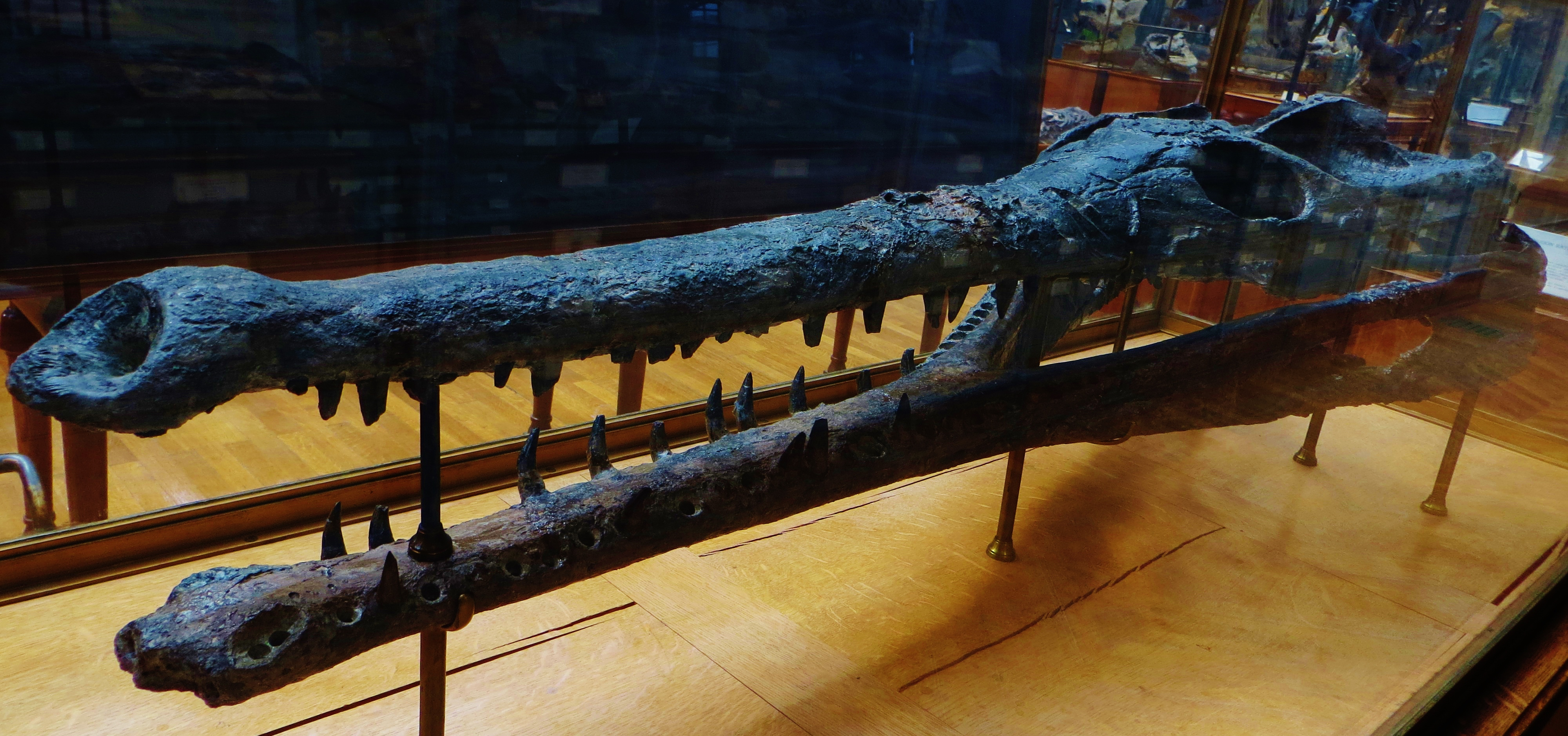 Fossil of Steneosaurus, an extinct reptile- Took the photo at Musee d'Histoire Naturelle, Paris